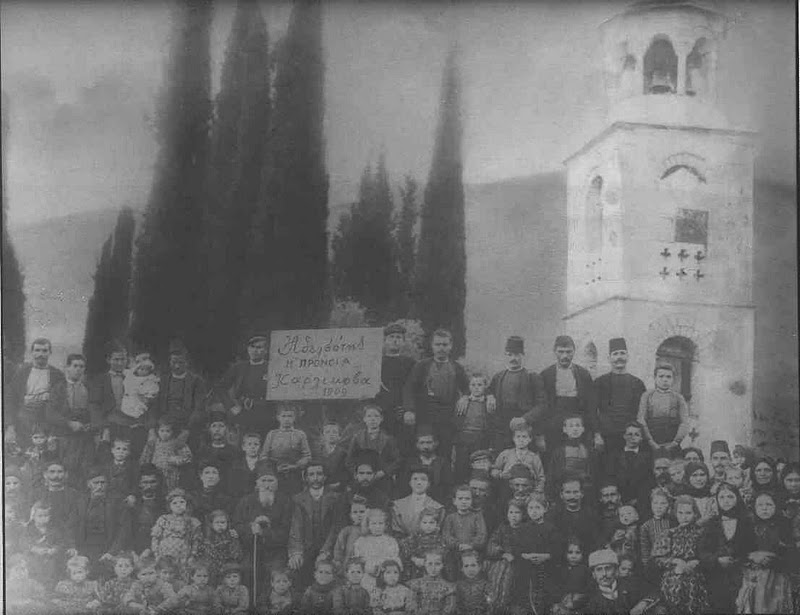 Гръцкото братство Прония в Карлъково.